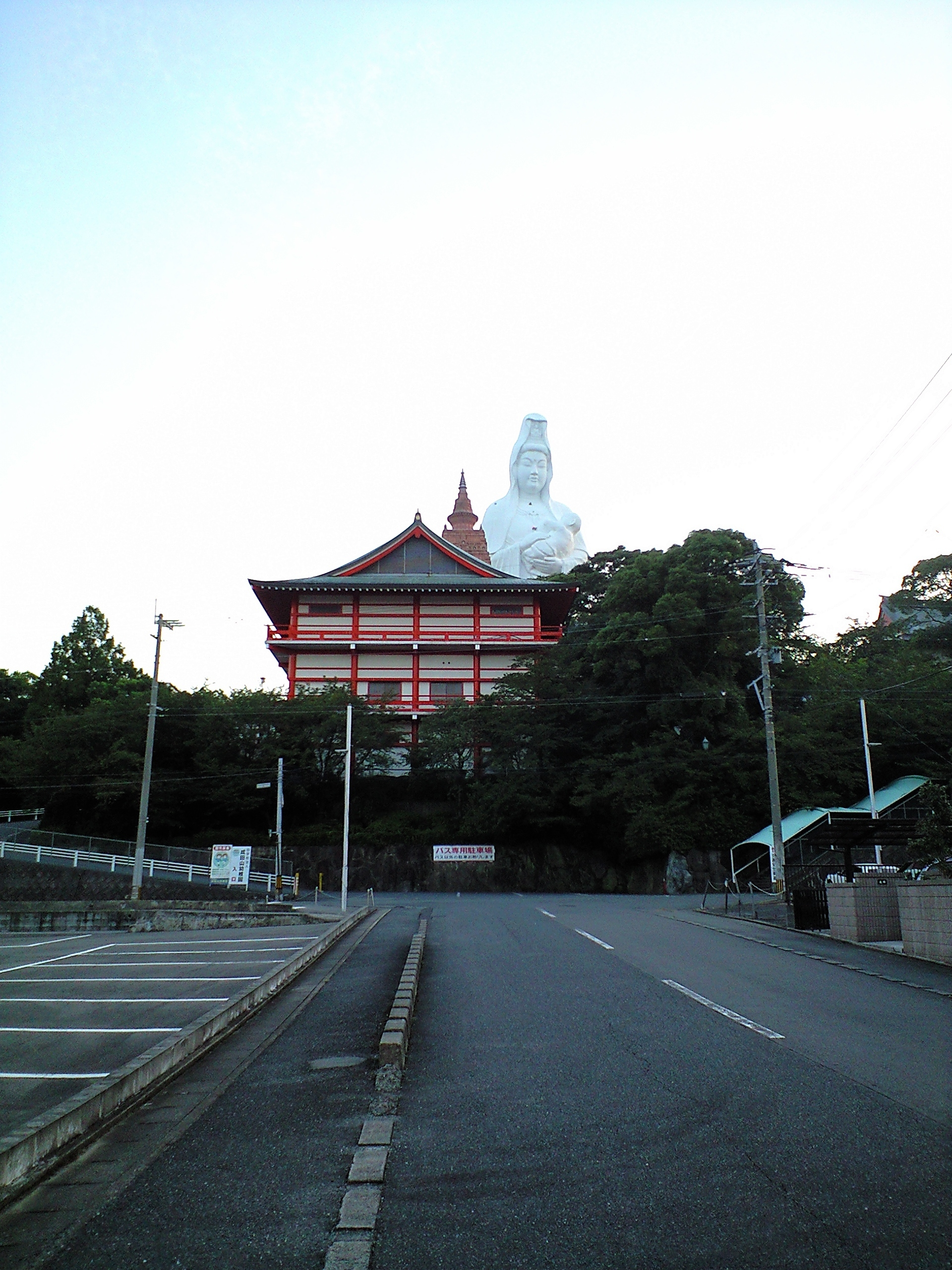 久留米 成田山